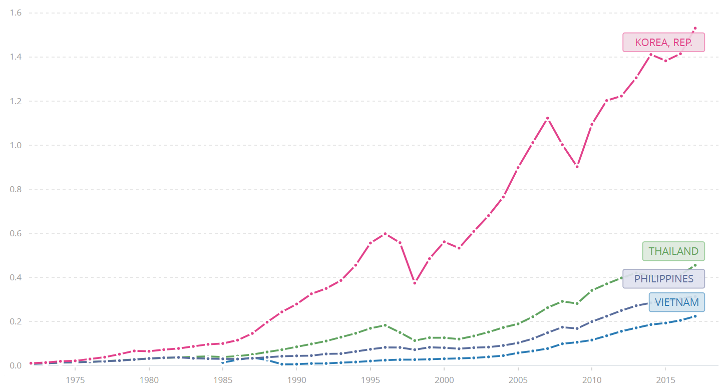 So sánh GDP của Việt Nam với các nước trong khu vực